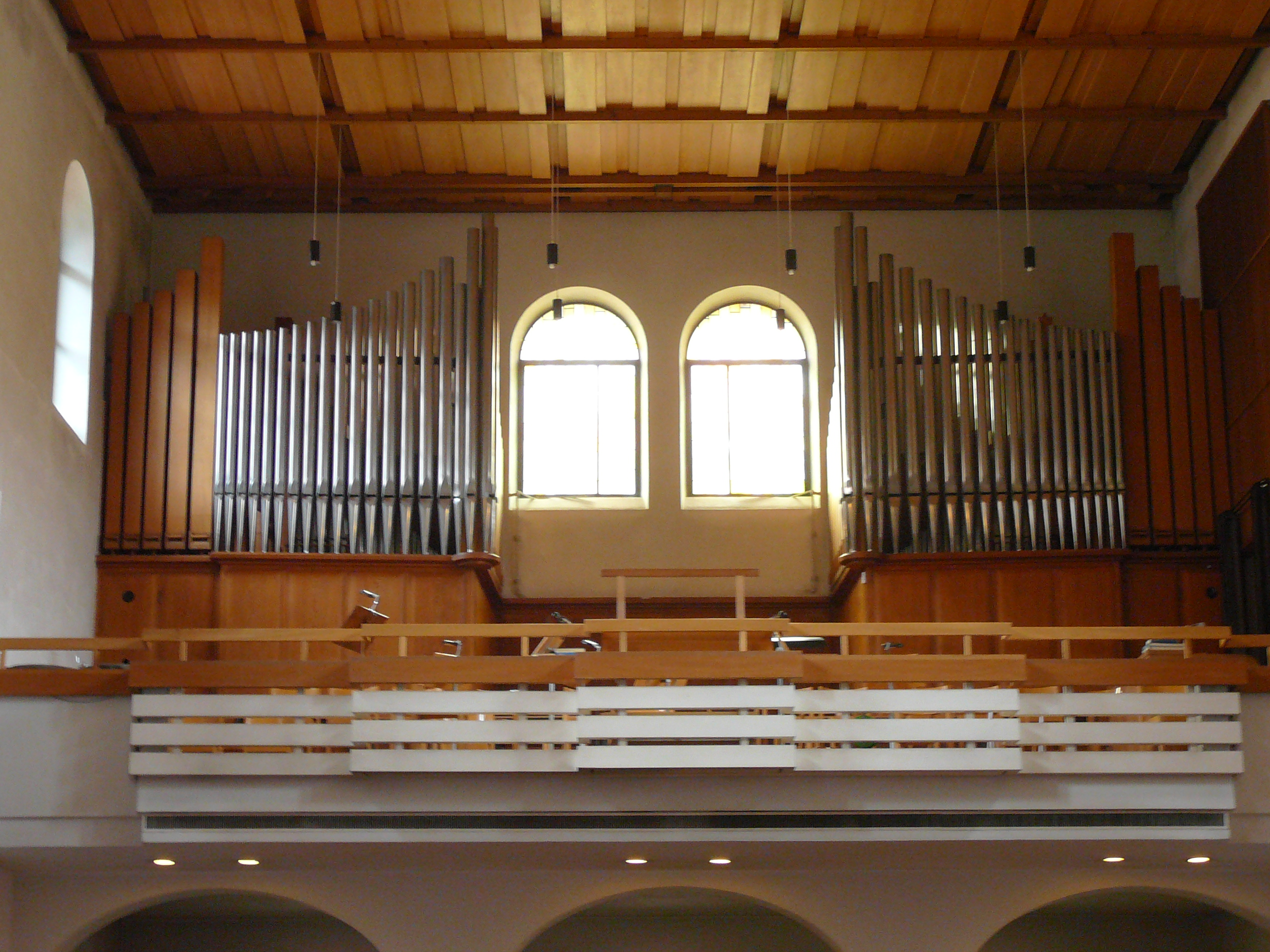 Römisch-katholische Kirche Herz Jesu Zürich-Wiedikon, Orgel